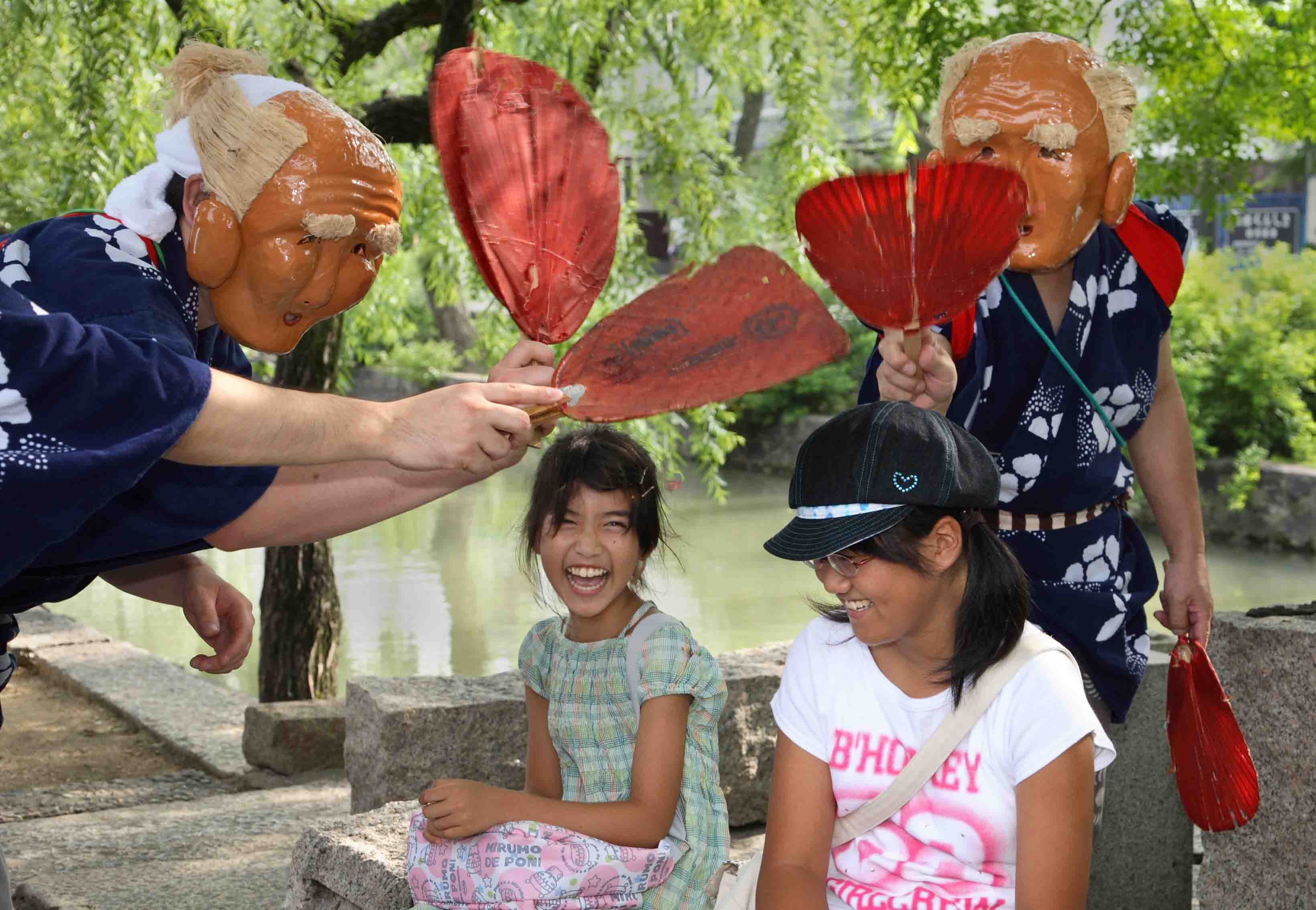 素隠居（倉敷の祭りのマスコット）